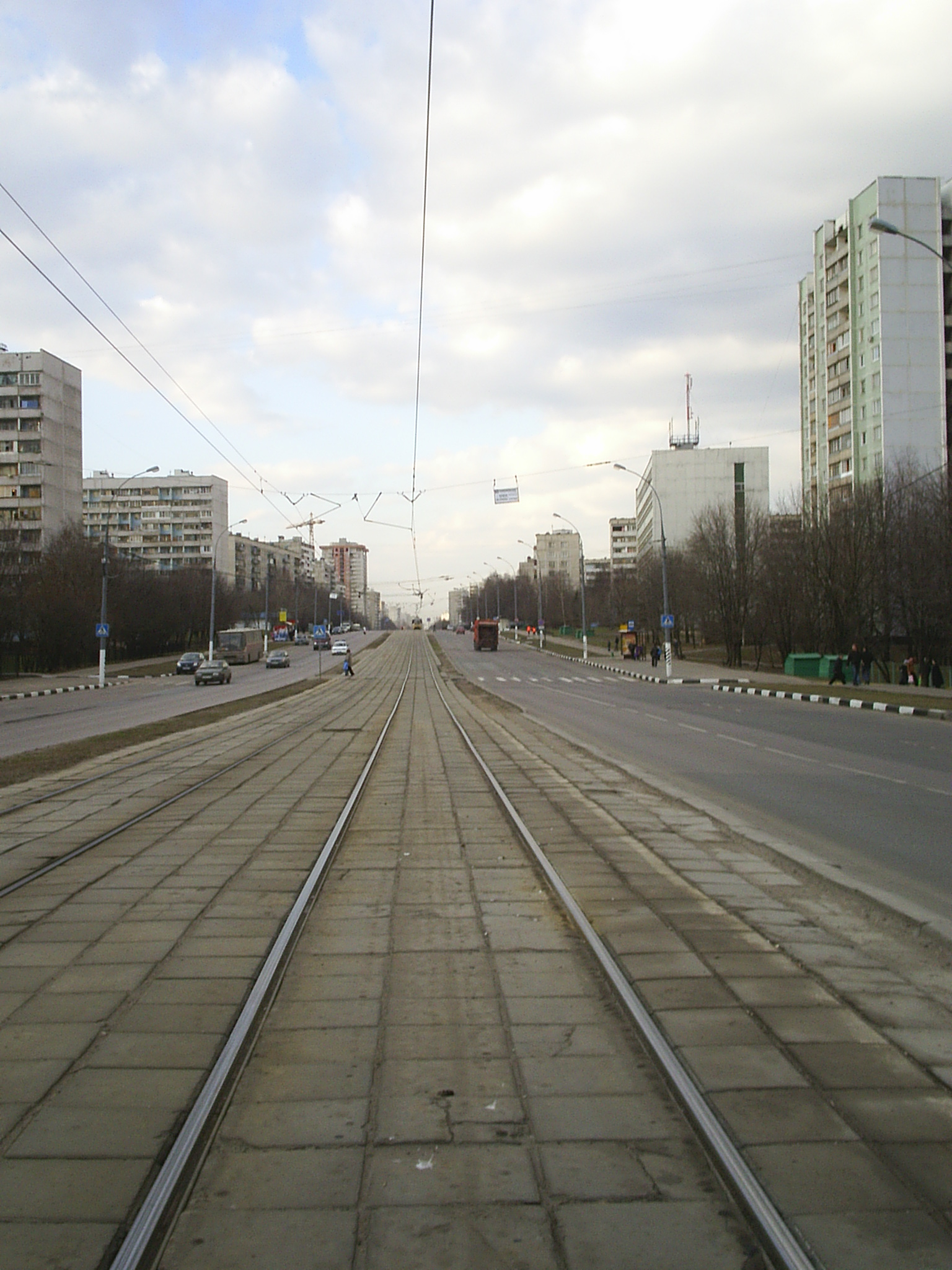 Вид на Чертановскую улицу в Москве.